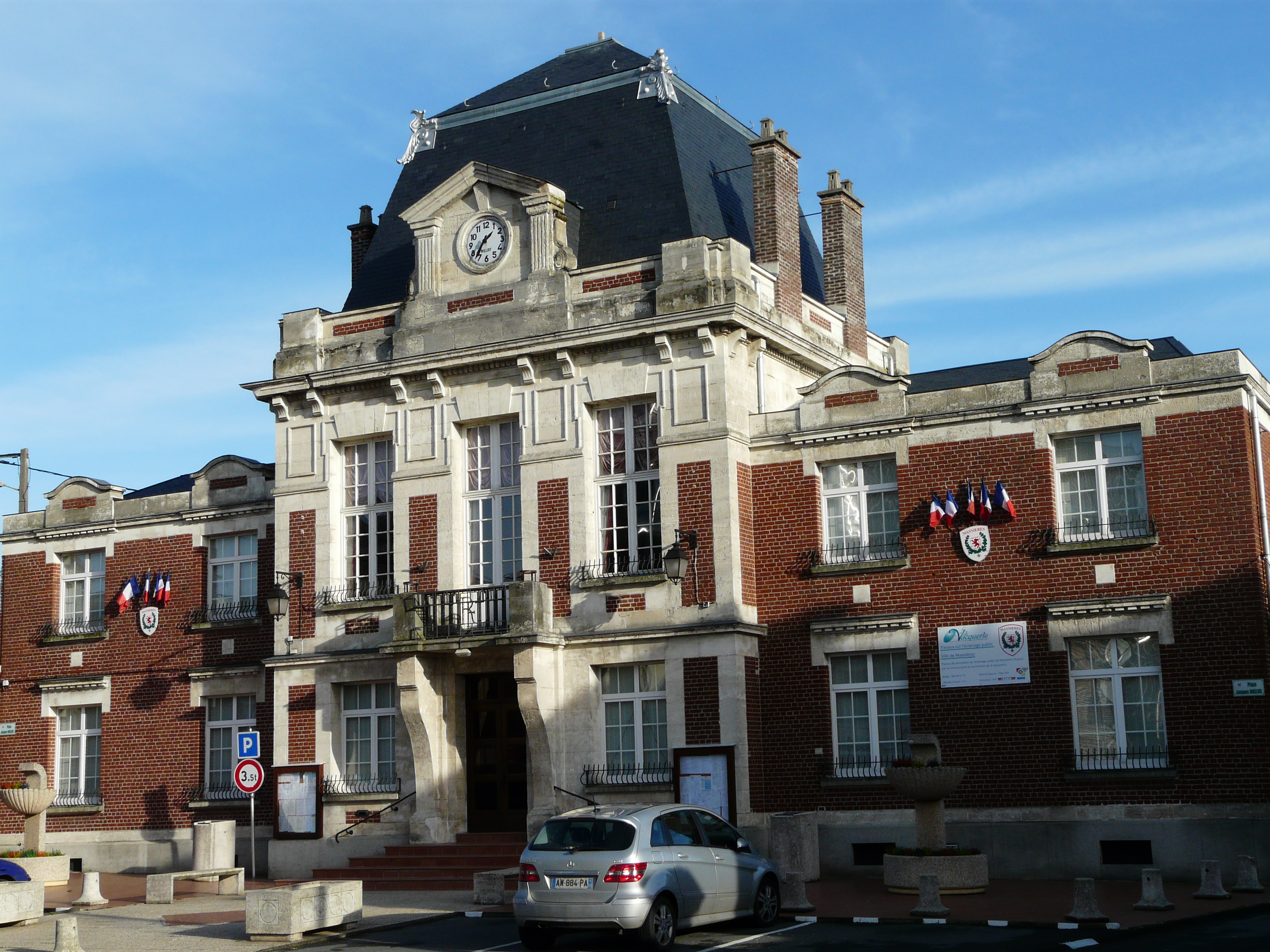 La mairie de Masnières